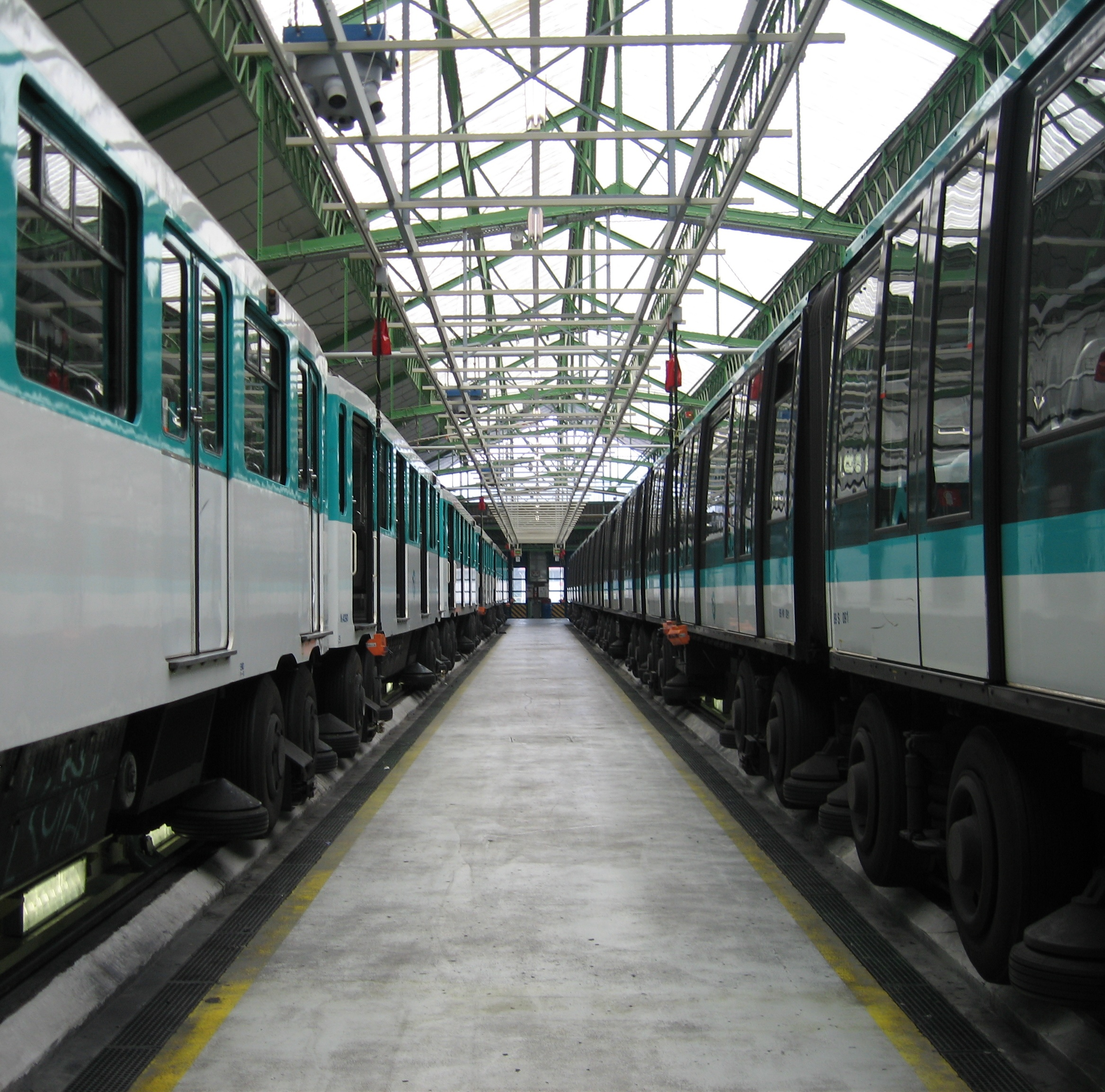 MP59 et MP89 en fosse à l'Atelier de Maintenance des Trains / JPO Ateliers de Saint-Ouen 06/06/2009.